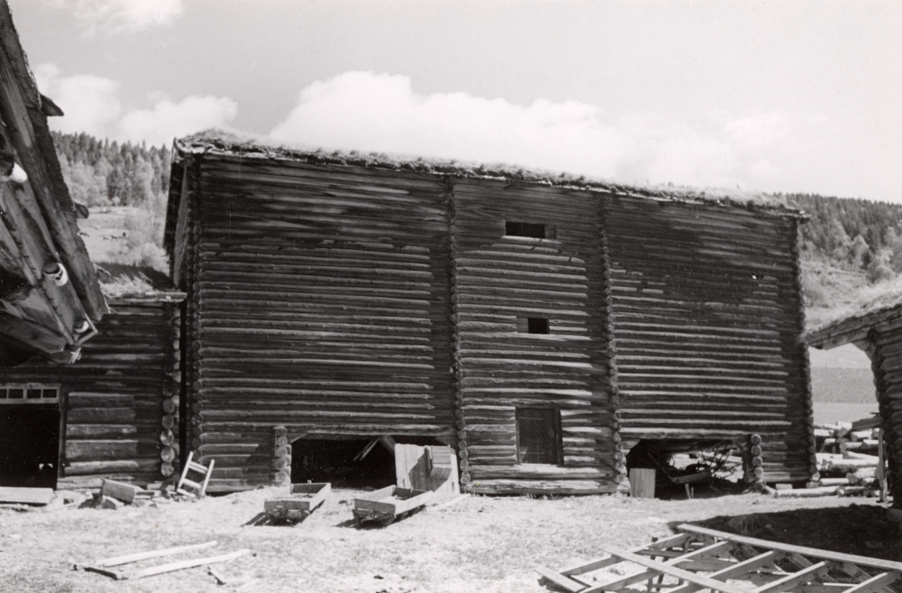 Hæringstad, Heringstad i Heidal, Oppland Øvre låve